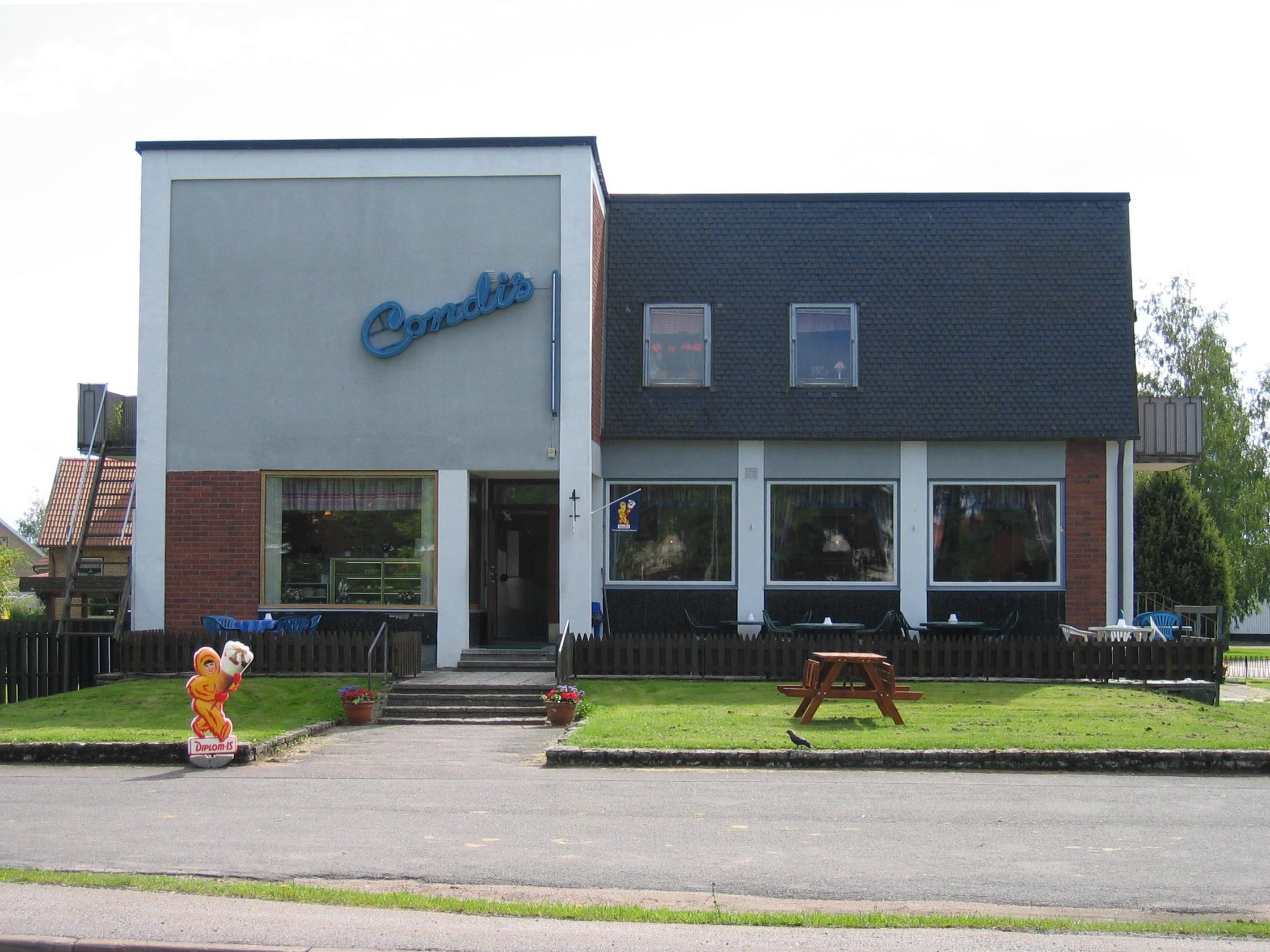 Konditoriet i Tidan. Bild tagen av mig själv, sommaren 2004. Photograph taken by me